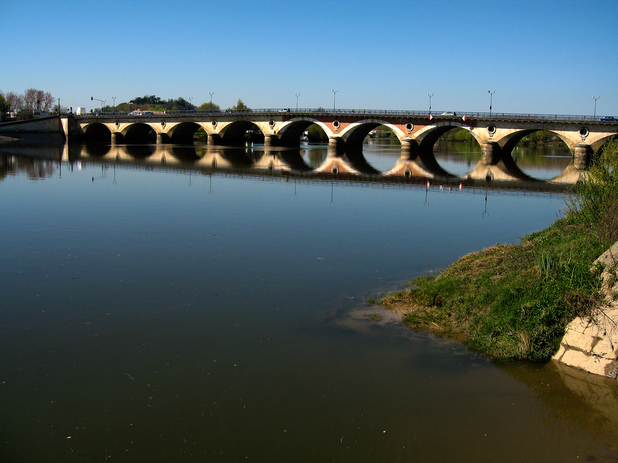 Libourne.